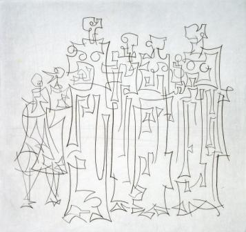 Teresa Sousa (1928-1962), "Grupo" (1959, gravura, buril, 250 x 240 mm)